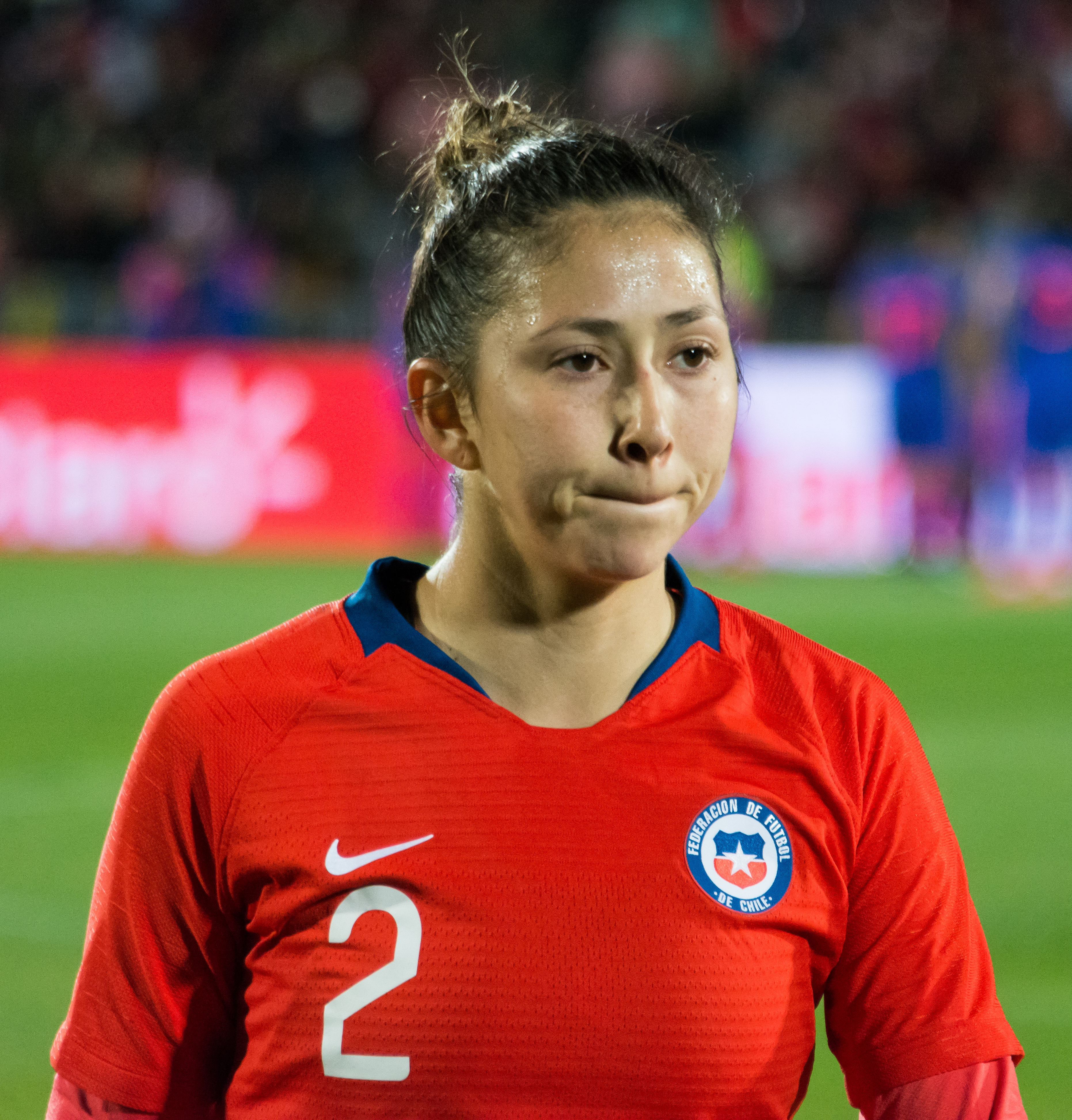 Rocío Soto, Chile v Colombia, Estadio Nacional, Ñuñoa, Santiago, Chile.